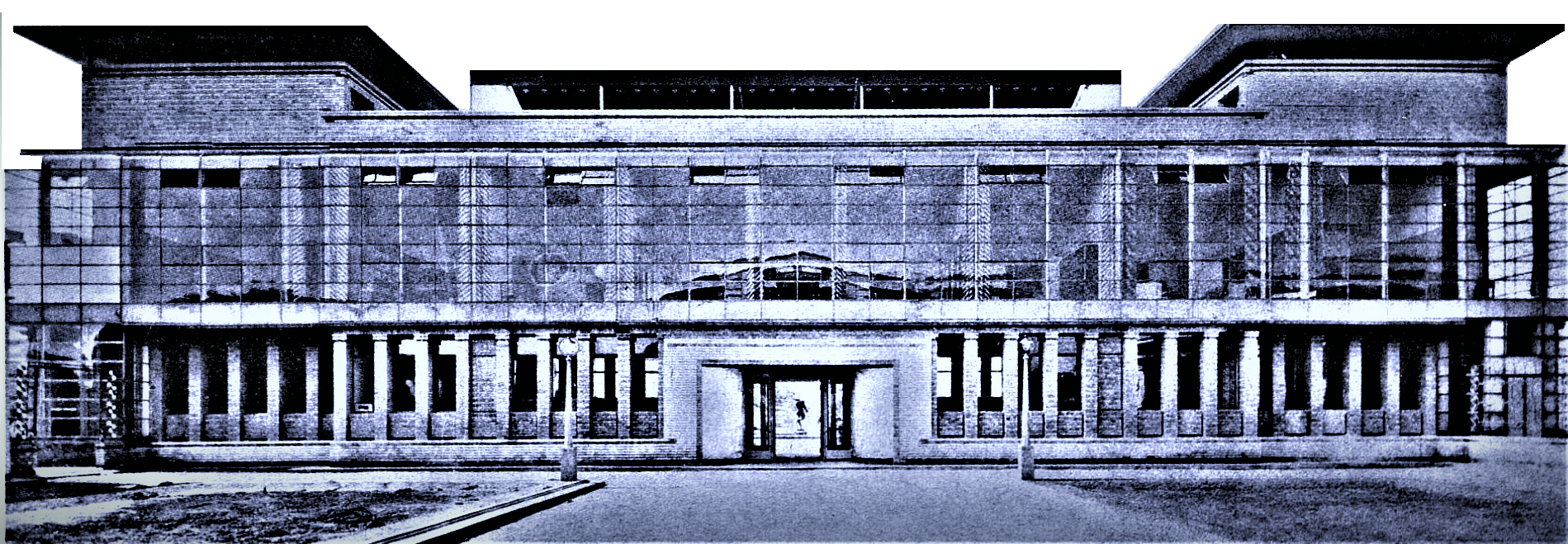 Walter Gropius, Adolf Meyer, Usine, Exposition du Deutscher Werkbund, Cologne 1914 (image du domaine public modifiée)